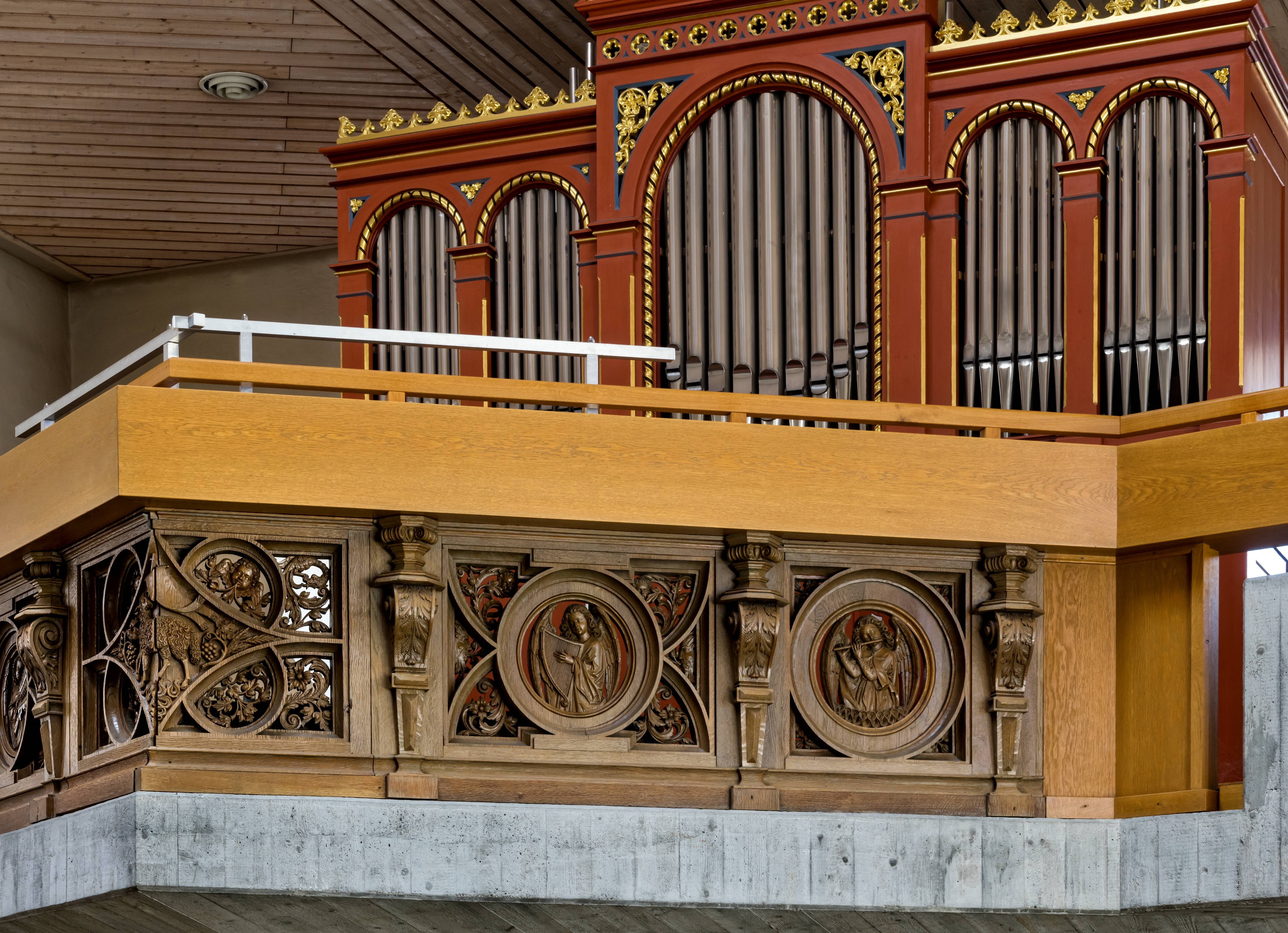 Bilder von St. Columba. in Pfaffenweiler Die Schnitzereien an der Empore und die Orgel